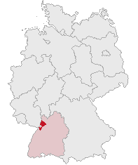 Landkreis Karlsruhe, Baden-Württemberg, Germany